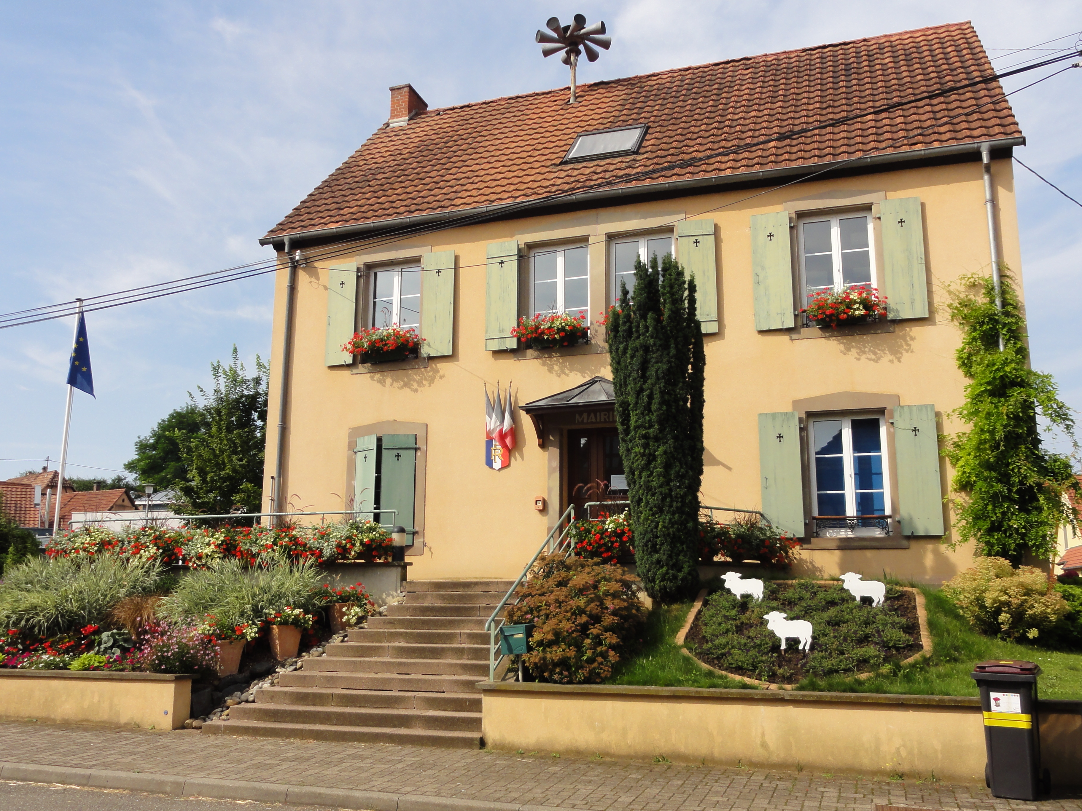 Alsace, Bas-Rhin, Kienheim, Mairie, 6 rue de l'Eglise.